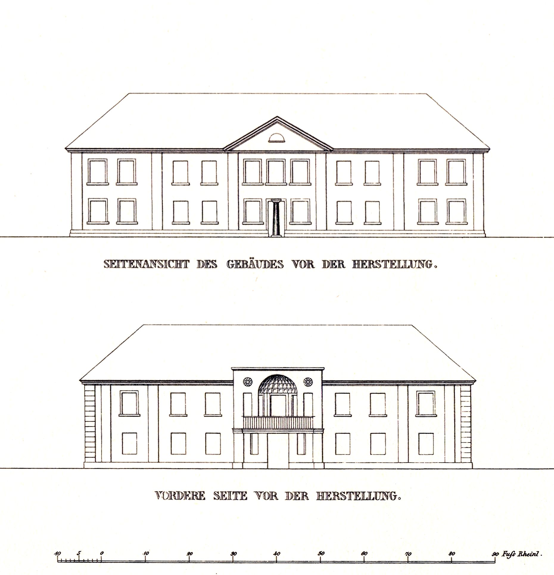 Schloss Glienicke in Schinkels Architektonischen Entwürfen, Ausschnitt vorheriger Zustand des Gebäudes